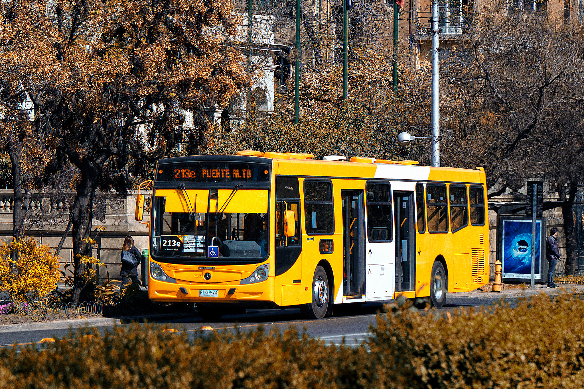 Bus Caio Mondego de STP en recorrido 213e en cercanias de parque forestal